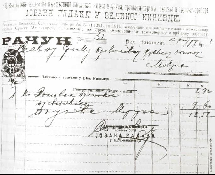 Рачун из књижаре Јована Радака